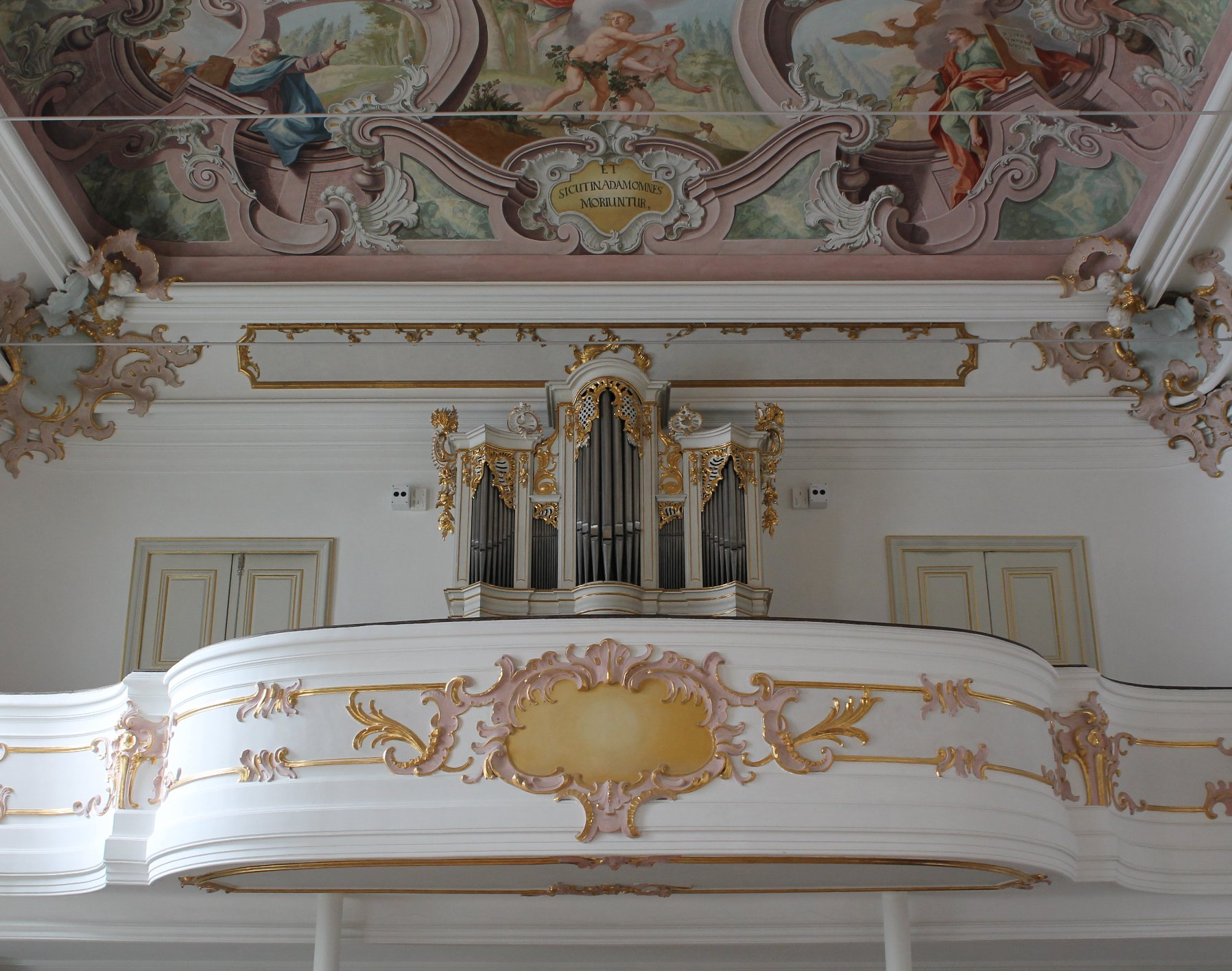 Orgel der Schlosskapelle von Schloss Haimhausen (1736, Quirin Weber, I/8)